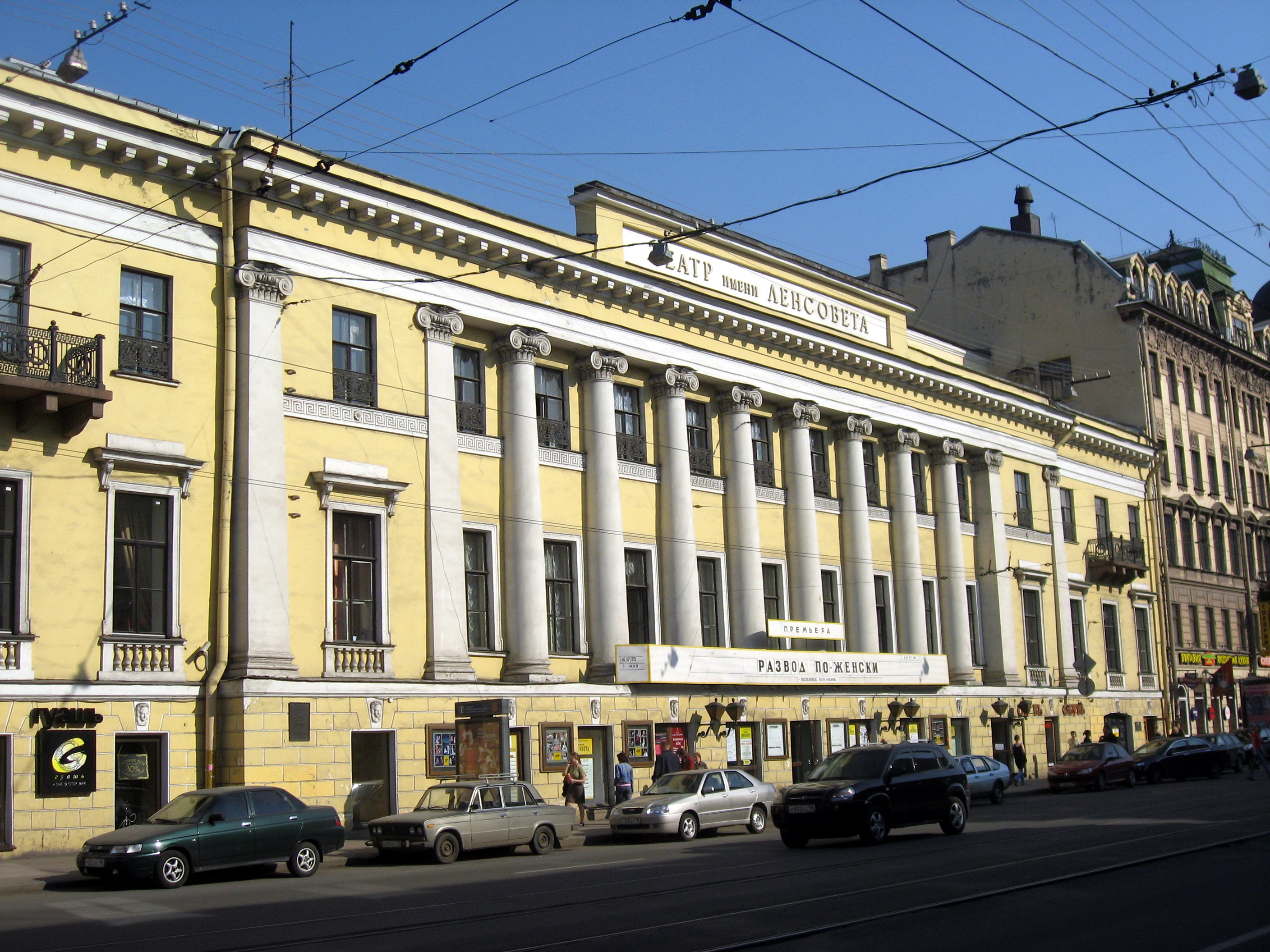 Sankt-Petěrburg (Petrohrad)